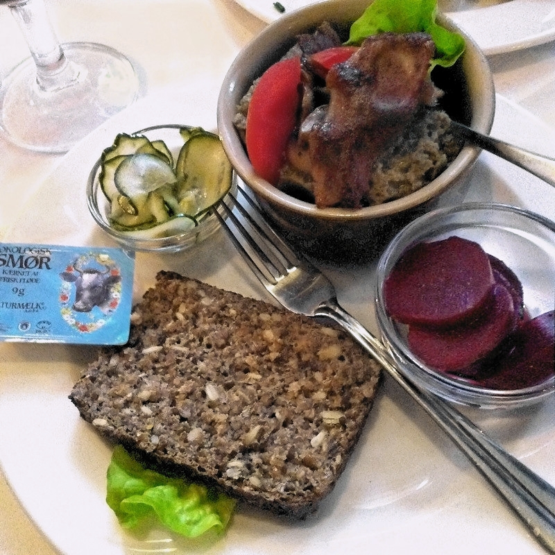 Smørrebrød zum Selbstzubereiten durch den Gast; hier mit Vollkornbrot, Butter (dänisch Smør), Leberpastete (dänisch Leverpostej) vom Schwein (mit Bacon und Tomatengarnitur), Gurken und Rote Bete.